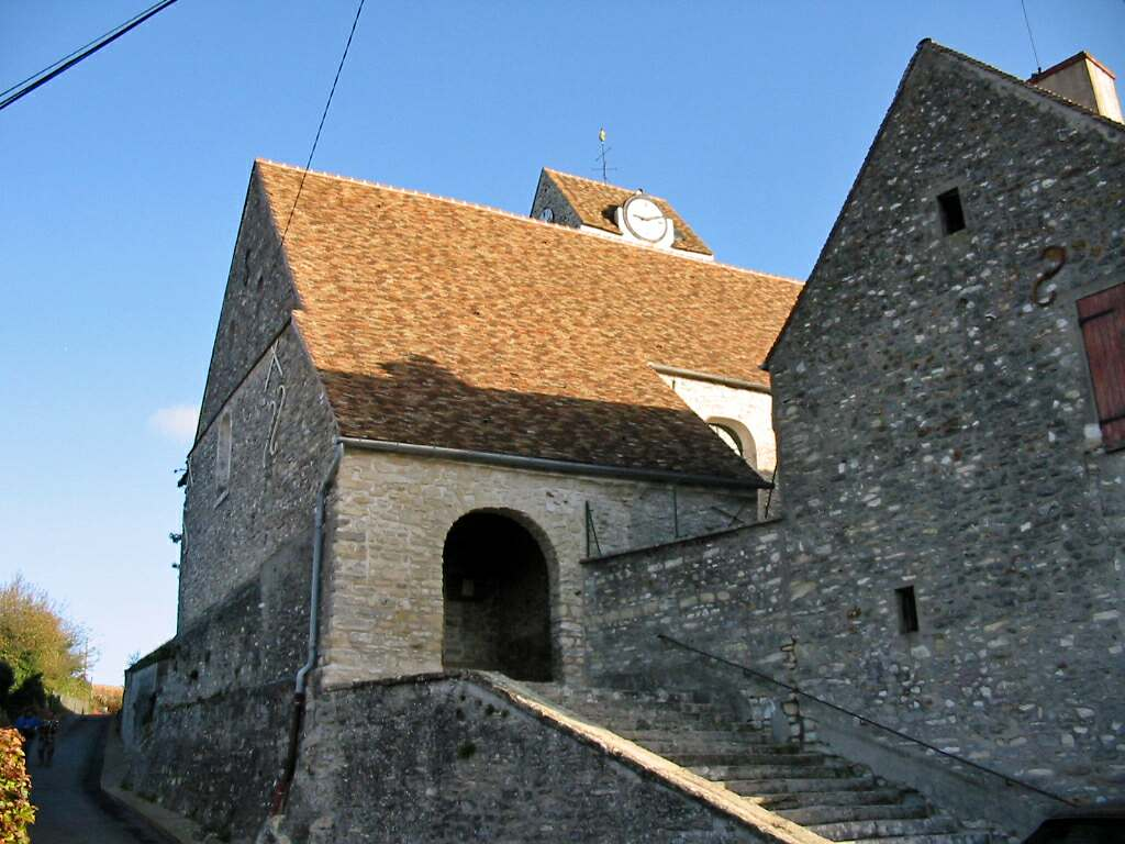 Église de Jumeauville (Yvelines) Photo JH Mora